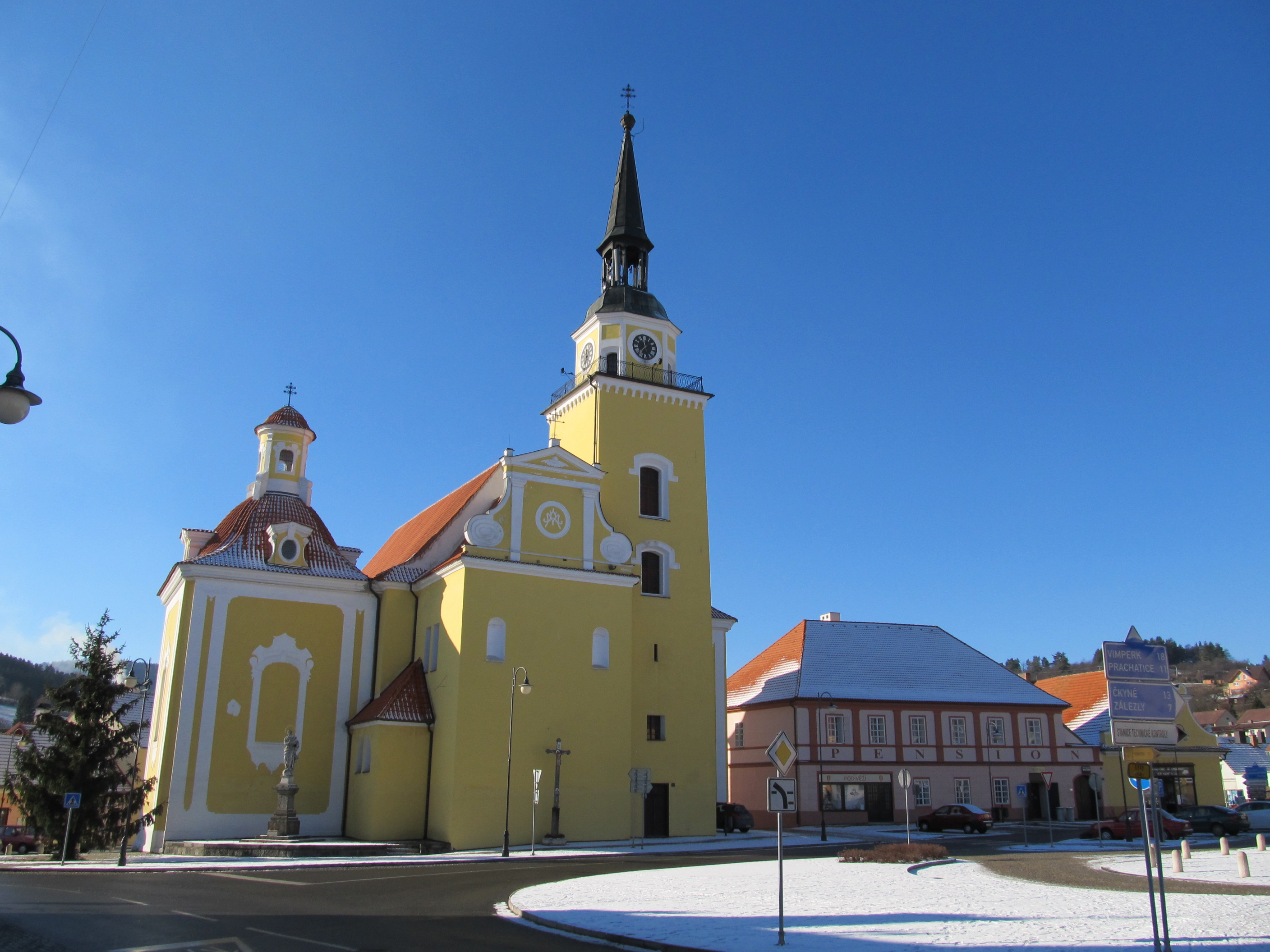 Vlachovo Březí - kostel Zvěstování Panny Marie